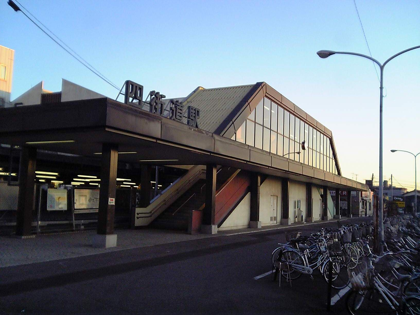 四街道駅南口